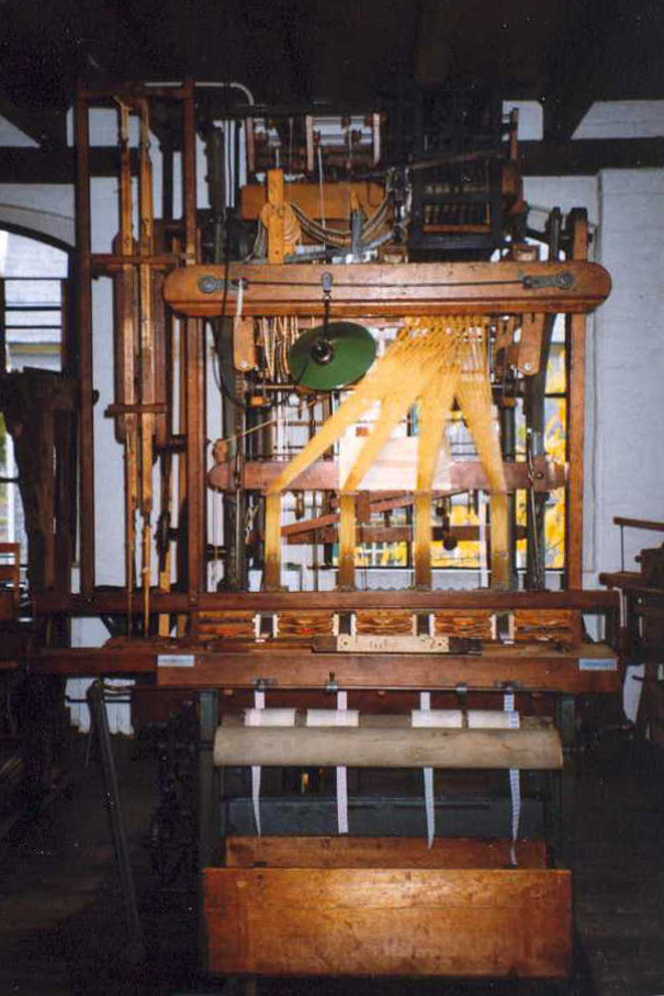 Eine Jacquard-Maschine im Historischen Zentrum Wuppertal